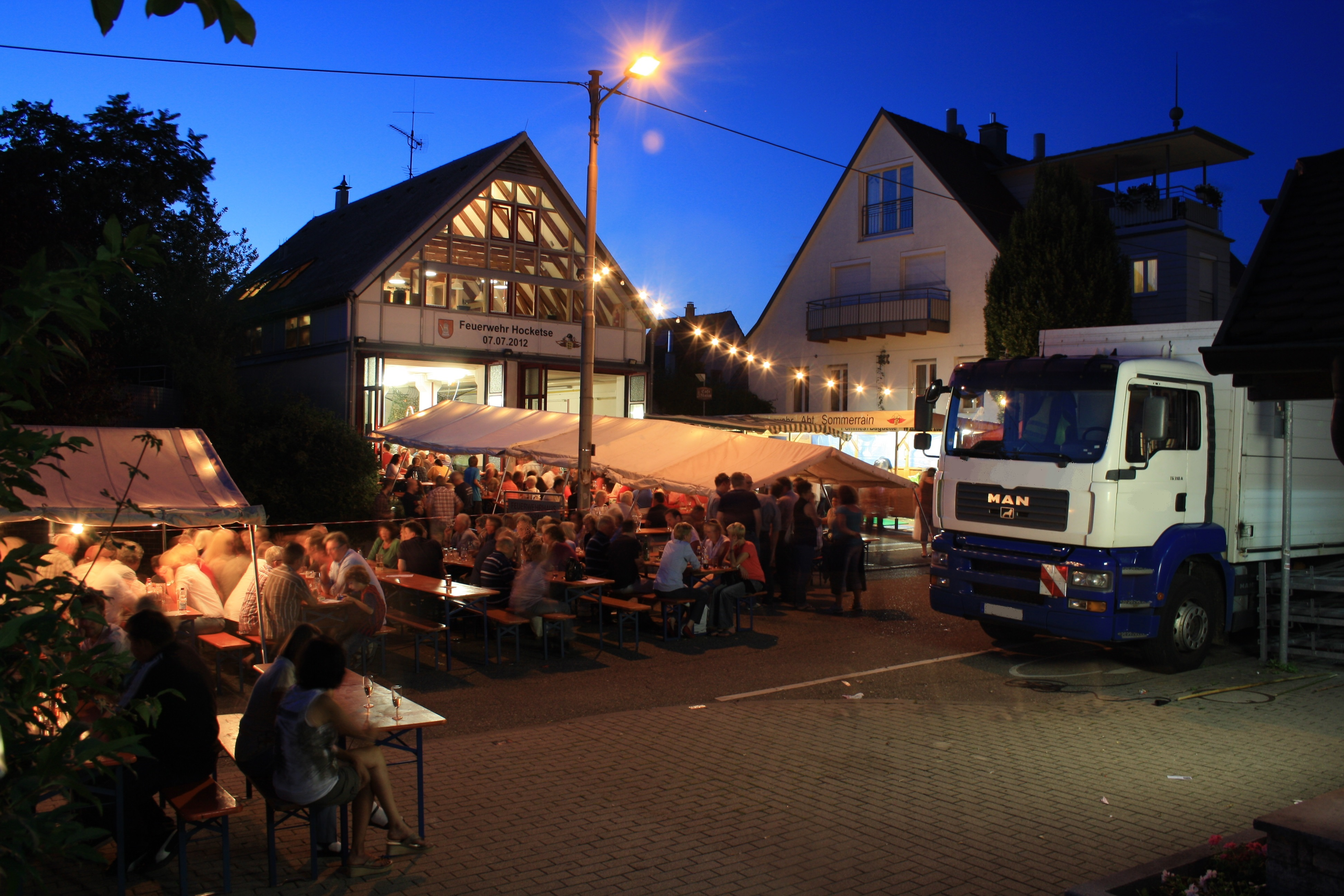 Jährlich stattfindendes Fest im Stuttgarter Stadtteil Sommerrain, die Feuerwehr-Hocketse vor dem Feuerwehrgerätehaus der Abteilung Sommerrain der Freiwilligen Feuerwehr Stuttgart.